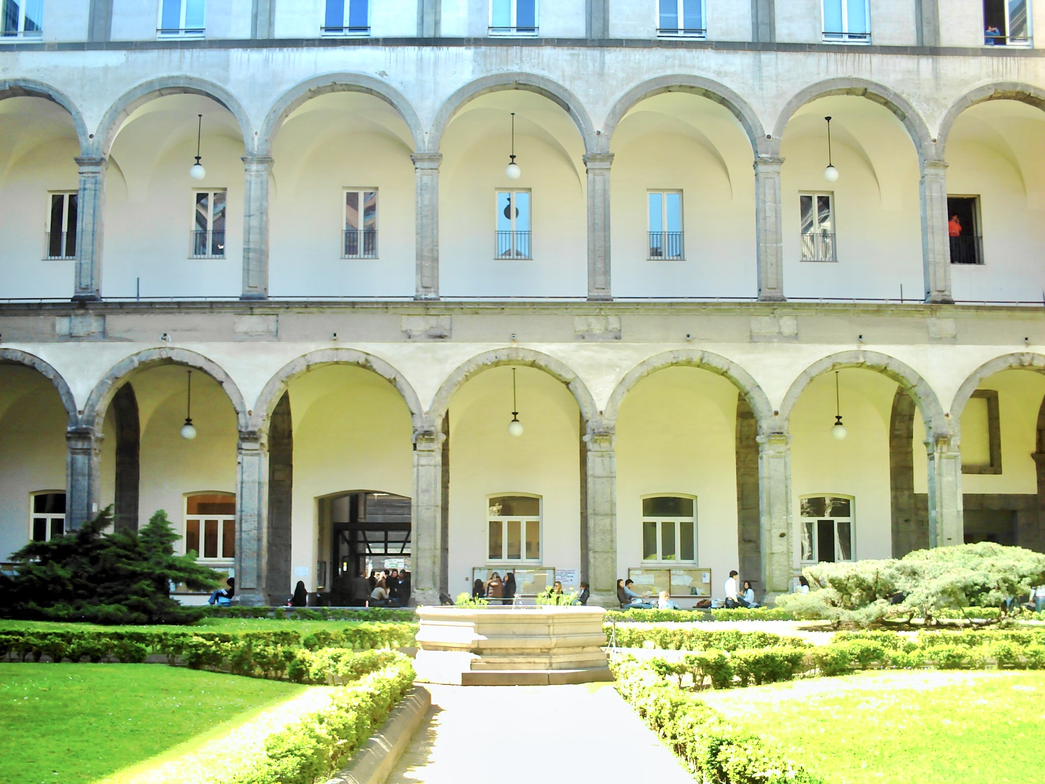 Chiostro di San Pietro Martire e fontana esagonale (Napoli)